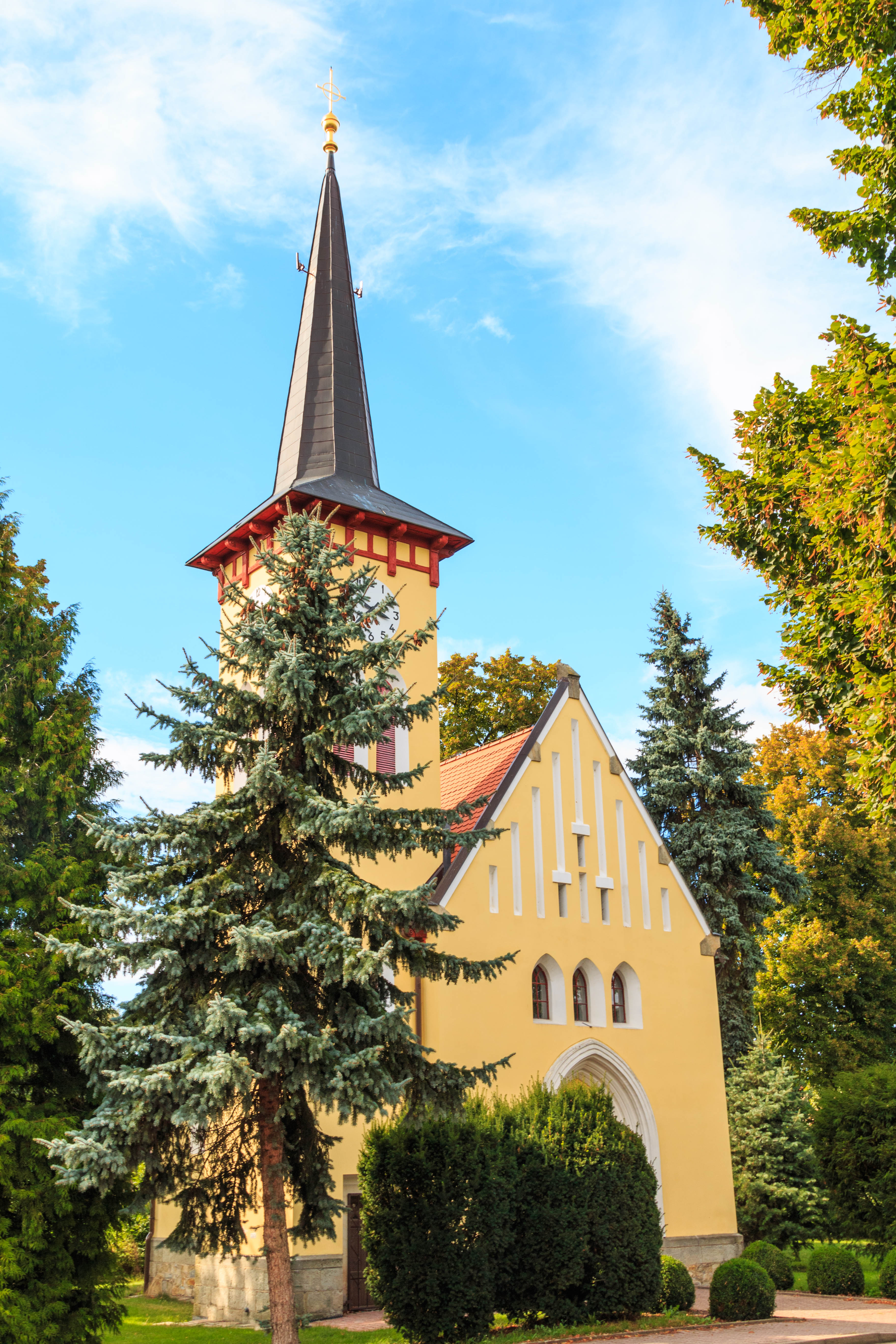 Kostěnice kaplička